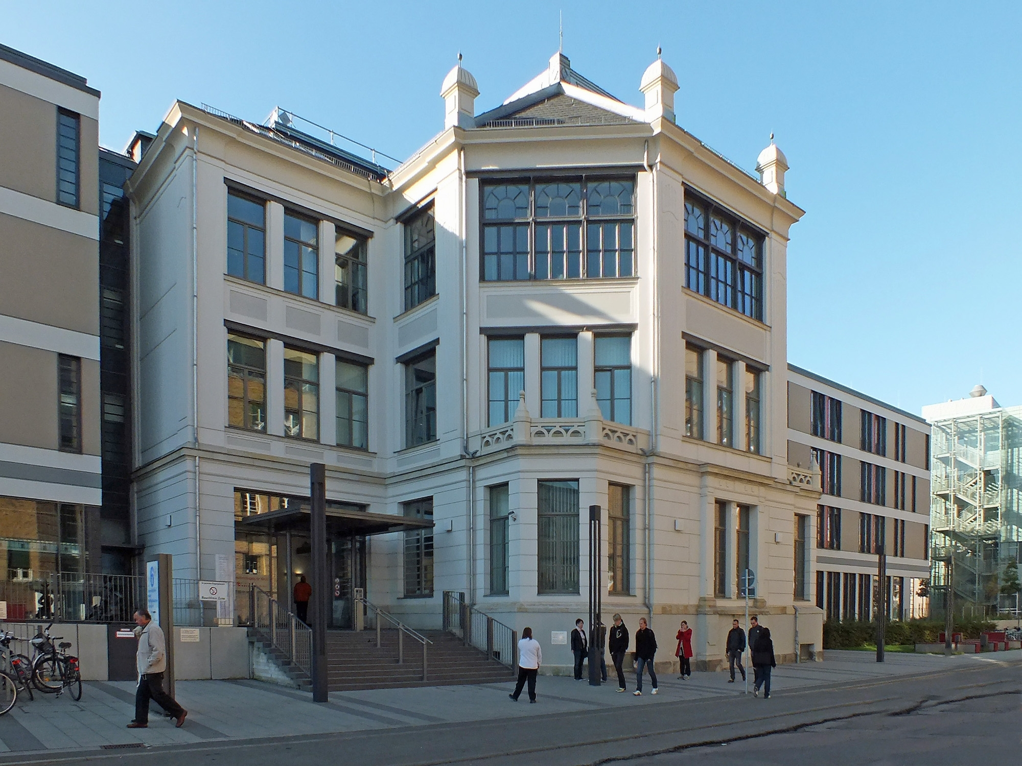 Der Eingang der Universitätfrauenklinik Leipzig, seit 2007 in der Liebigstraße